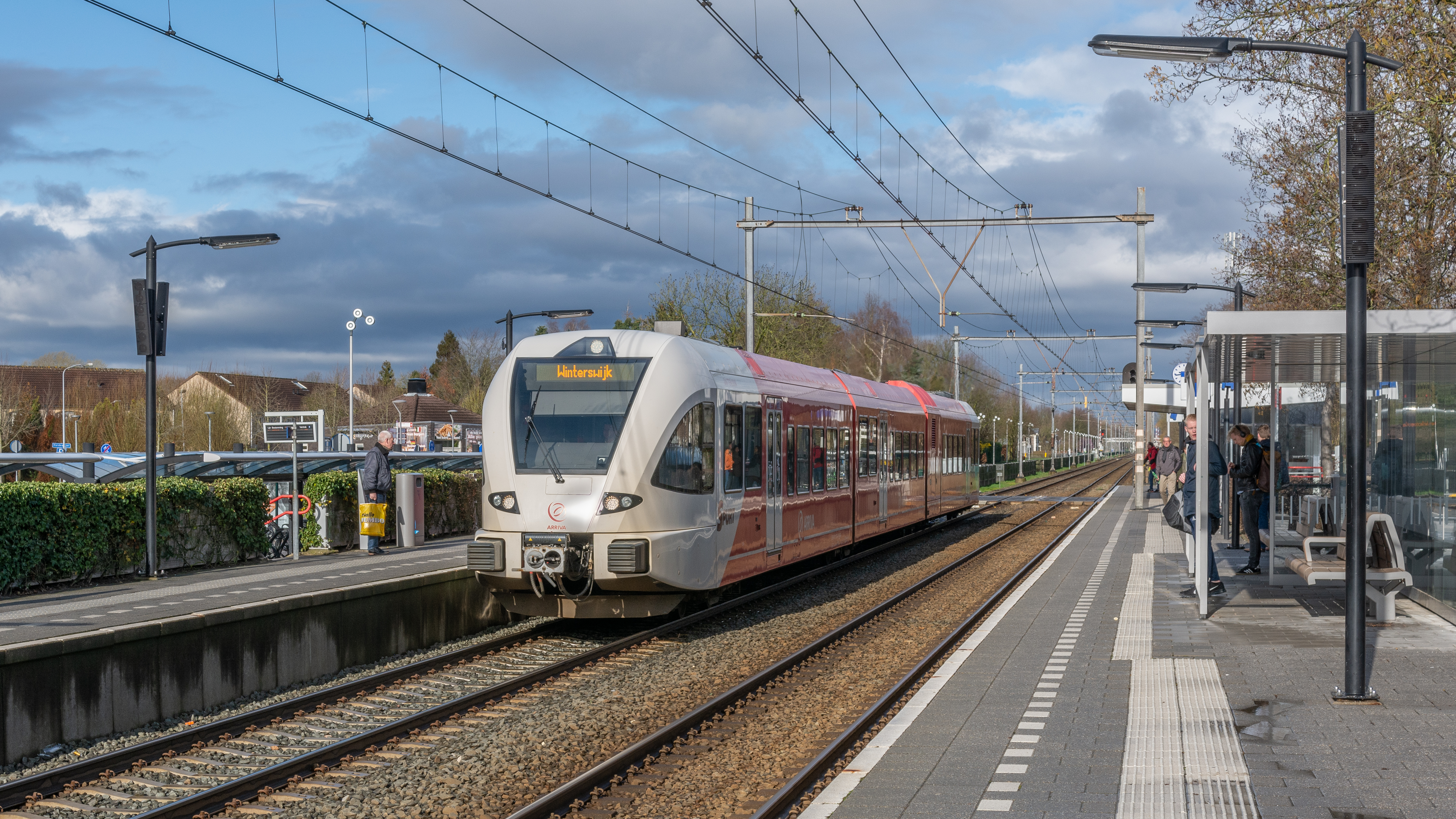 Op zondagmorgen vertrekt Arriva GTW 374 (Jan Terlouw) uit Duiven. Het stel is onderweg als trein 30925 van Arnhem Centraal naar Winterswijk.